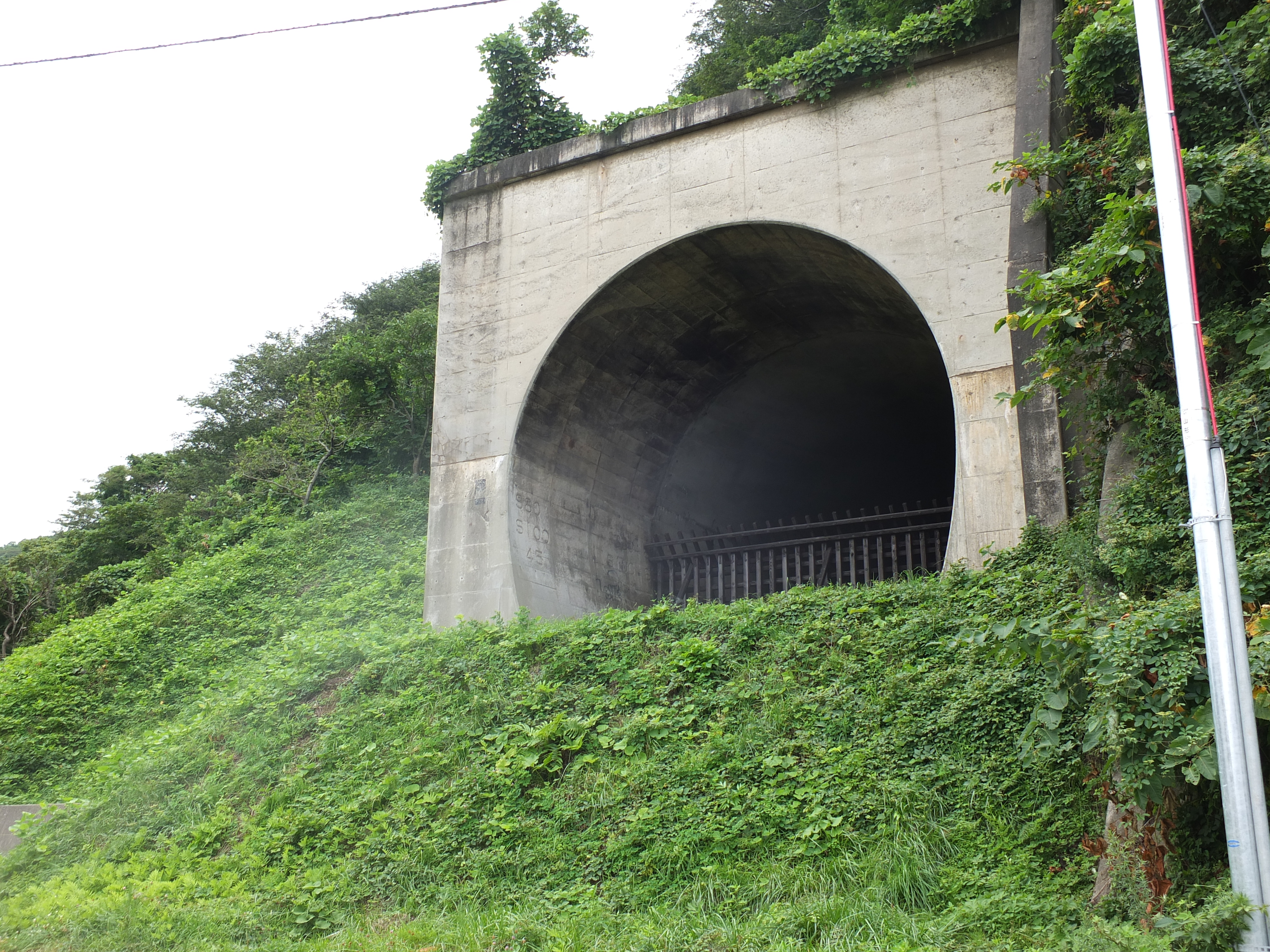 羽越本線 小岩川駅-あつみ温泉駅間の新線予定地で竣工・放置されている宮名トンネル（あつみ温泉方坑口）